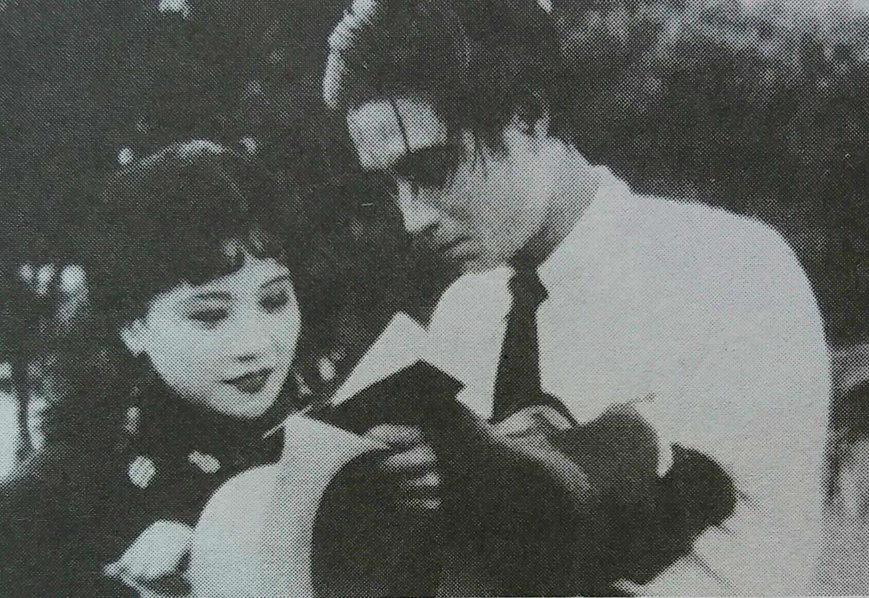 恋爱与义务剧照